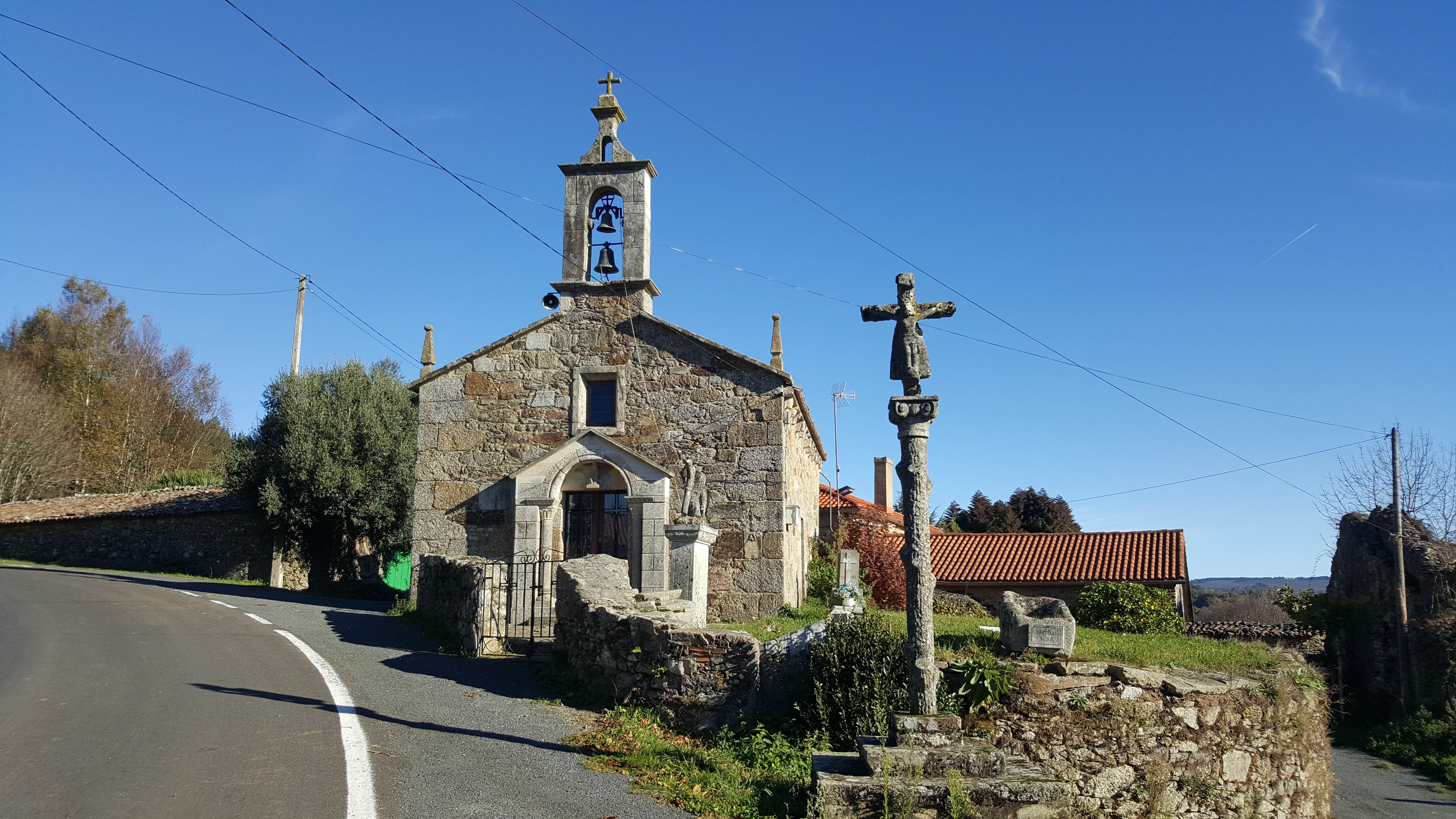 Igrexa de Santa Uxía de Toques (Toques)